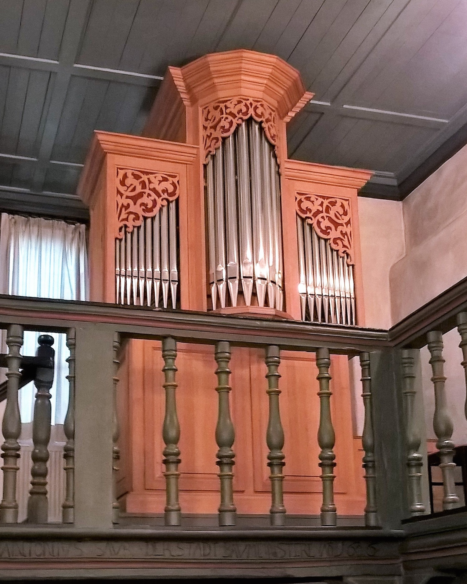 St. Jost in Marburg-Weidenhausen, Landkreis Marburg-Biedenkopf, Hessen, Deutschland